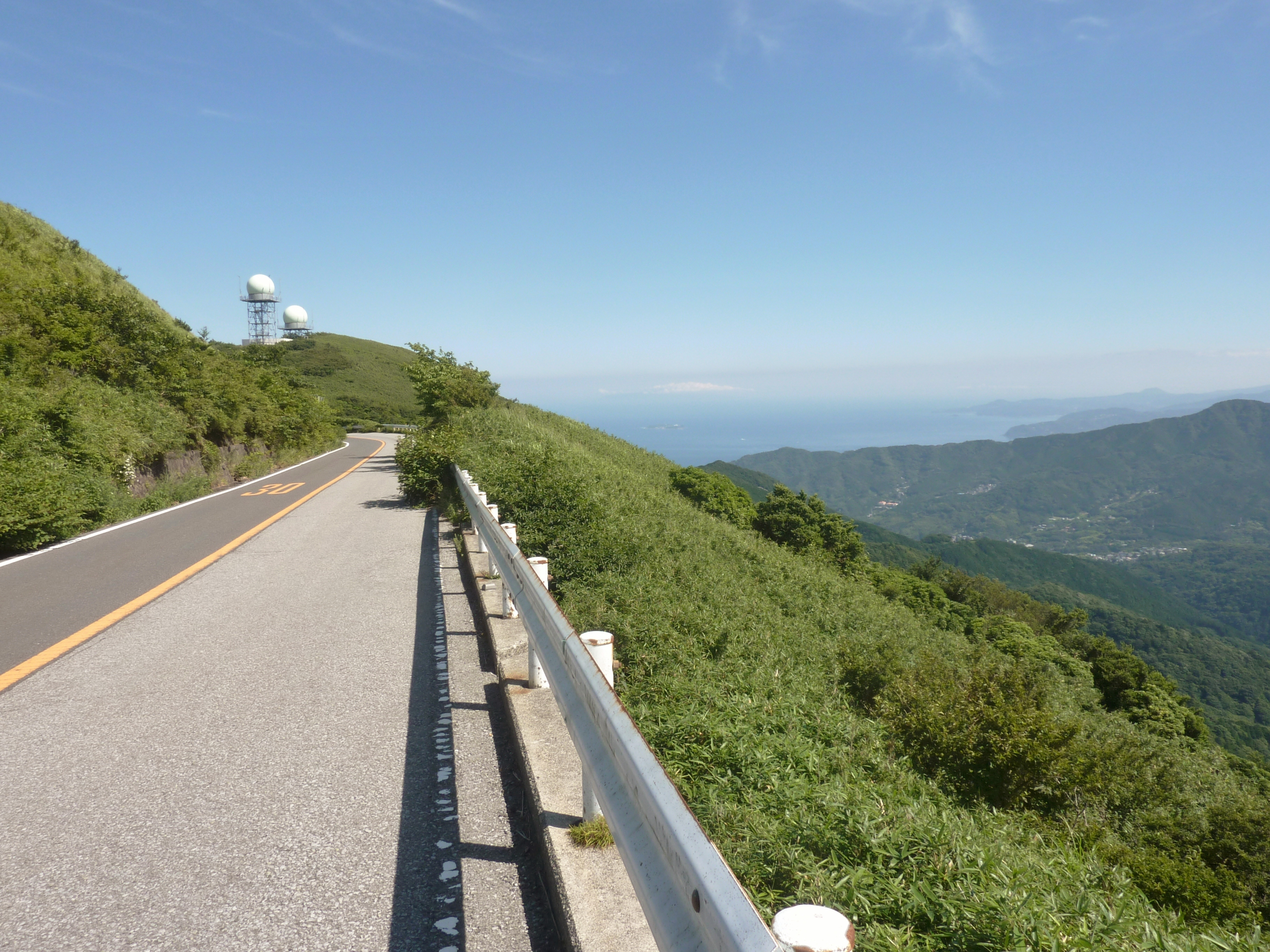 椿ラインの航空路監視レーダー局付近より相模灘を望む（神奈川県湯河原町）